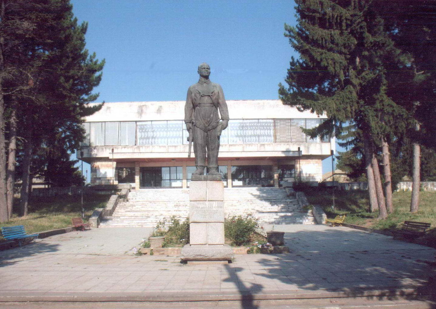 Читалището на село Светлен, Поповско.